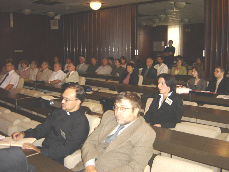 Mohačka pogibelj 1526.-2006., znanstveni kolokvij u Belom Manastiru, 29. VIII. 2006.